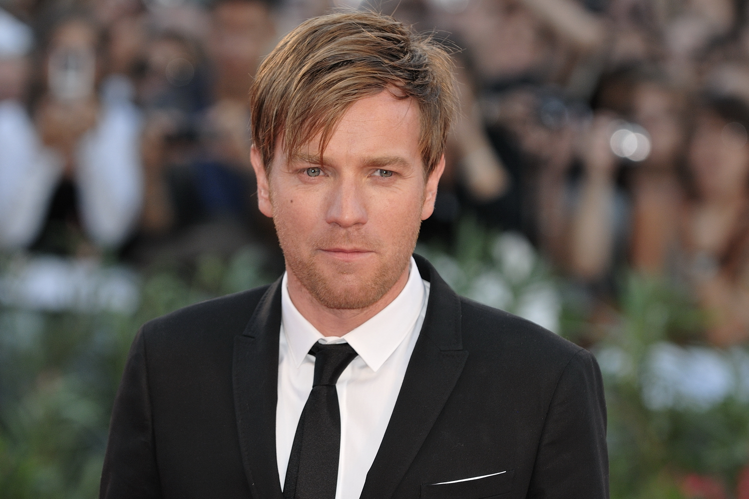 66ème Festival du Cinéma de Venise (Mostra), 6ème jour (07/09/2009) Tapis Rouge avec George Clooney et Elisabetta Canalis, Ewan McGregor et le réalisateur Grant Heslov pour le film : The men who stare at goats